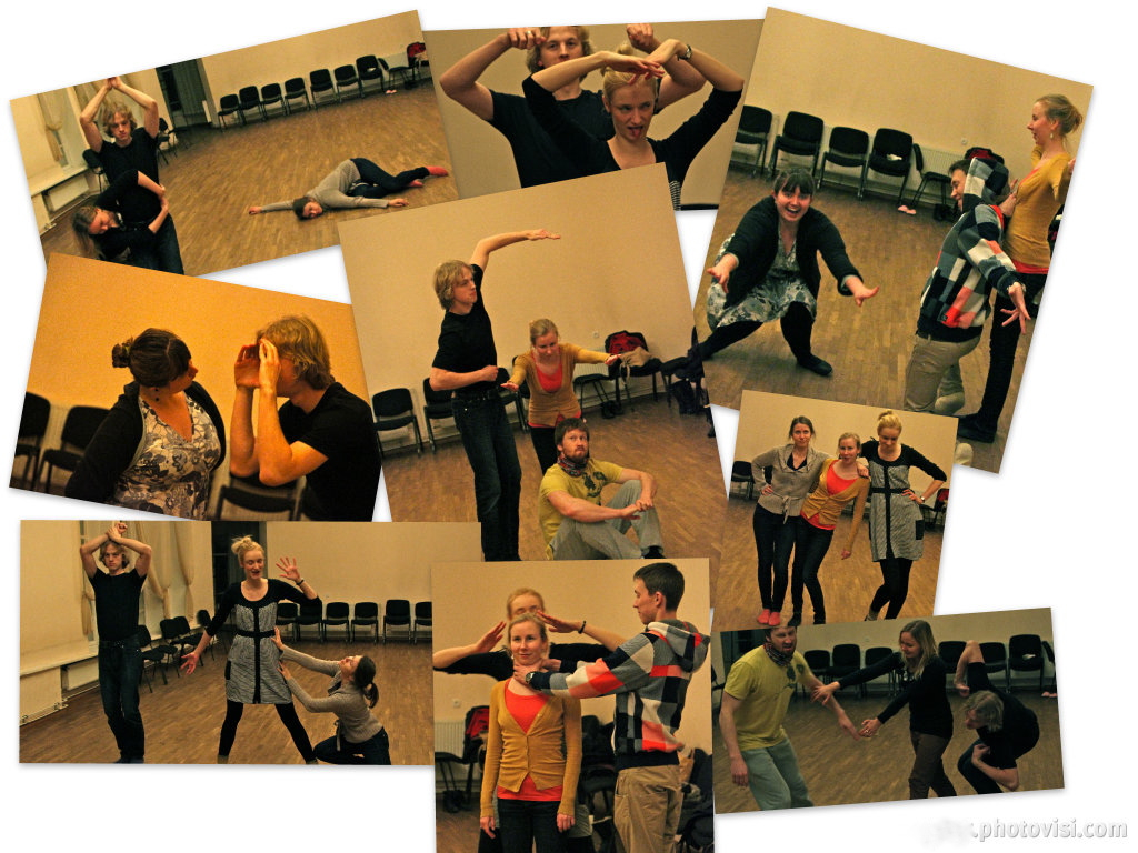 Altermannid proovis